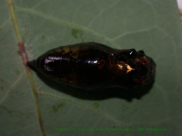 Idea malabarica pupa, India